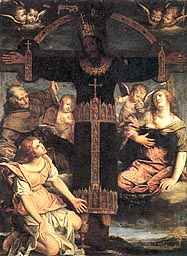 Paolo Biancucci (1583–1653), VOLTO SANTO CON SAN BERNARDINO, LA MADDALENA E ANGELI, 1640 post-1650 ante, Chiesa di S. Paolino, Viareggio